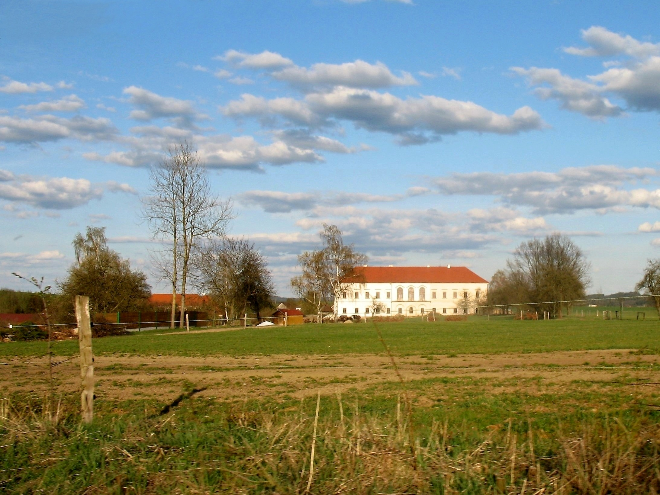 Starý a nový zámek s hospodářstvím ve Svinné